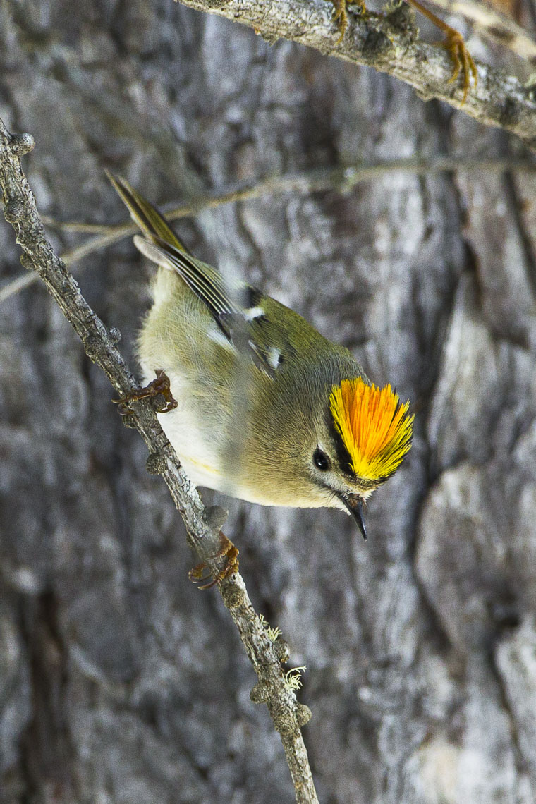 Goldcrest ( Regolo ) - Val d'Aosta - Italy_S4E4395